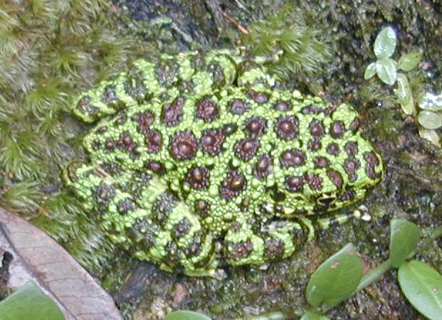 イシカワガエル(沖縄本島・比地大滝付近で撮影。Rana ishikawae found at hiji-otaki fall)